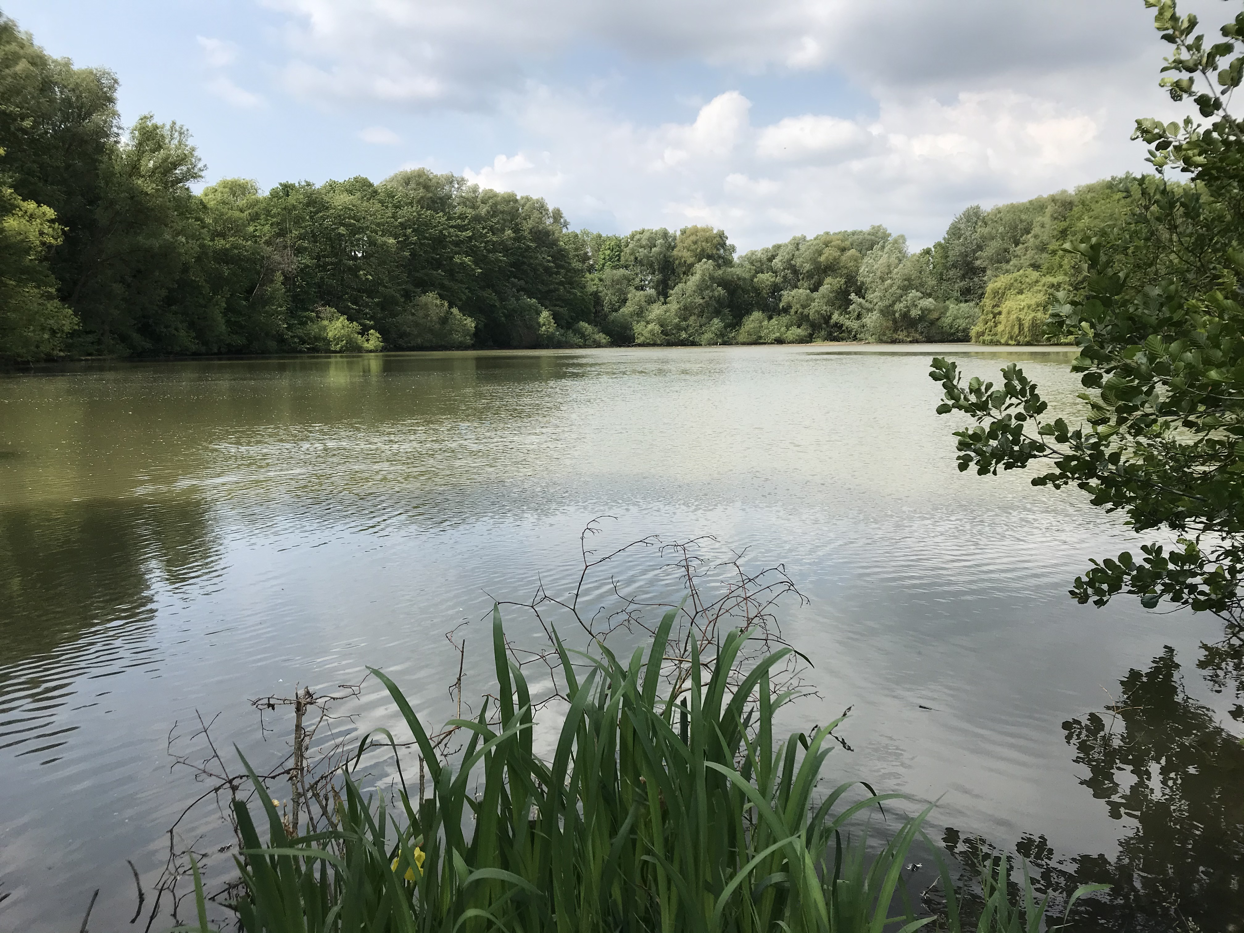 Rauhwiesensee (Ilvesbach) bei Sinsheim